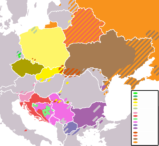 Slavic languages Blanco